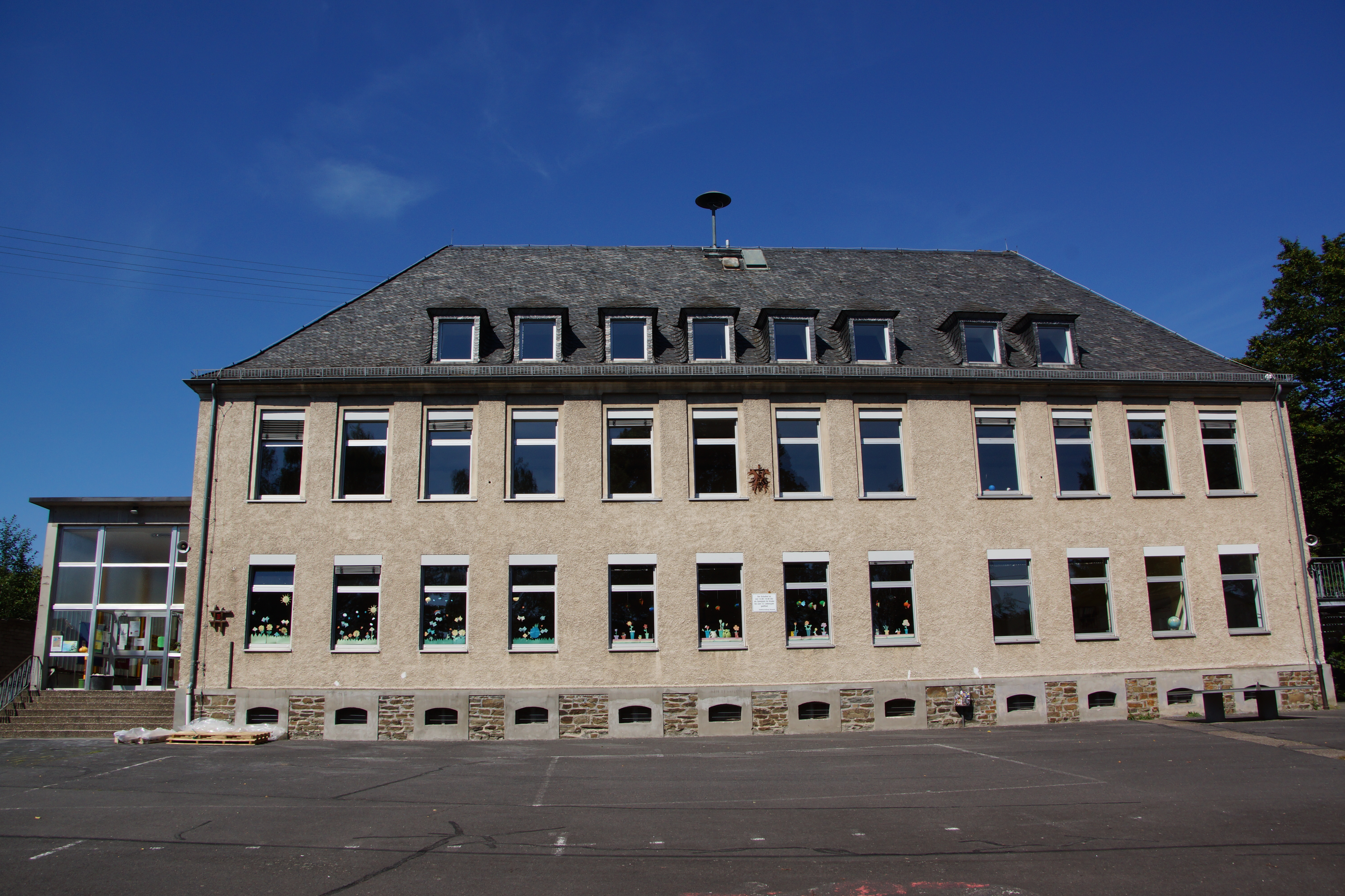 Grundschule Maria Goretti in Heimbach-Weis